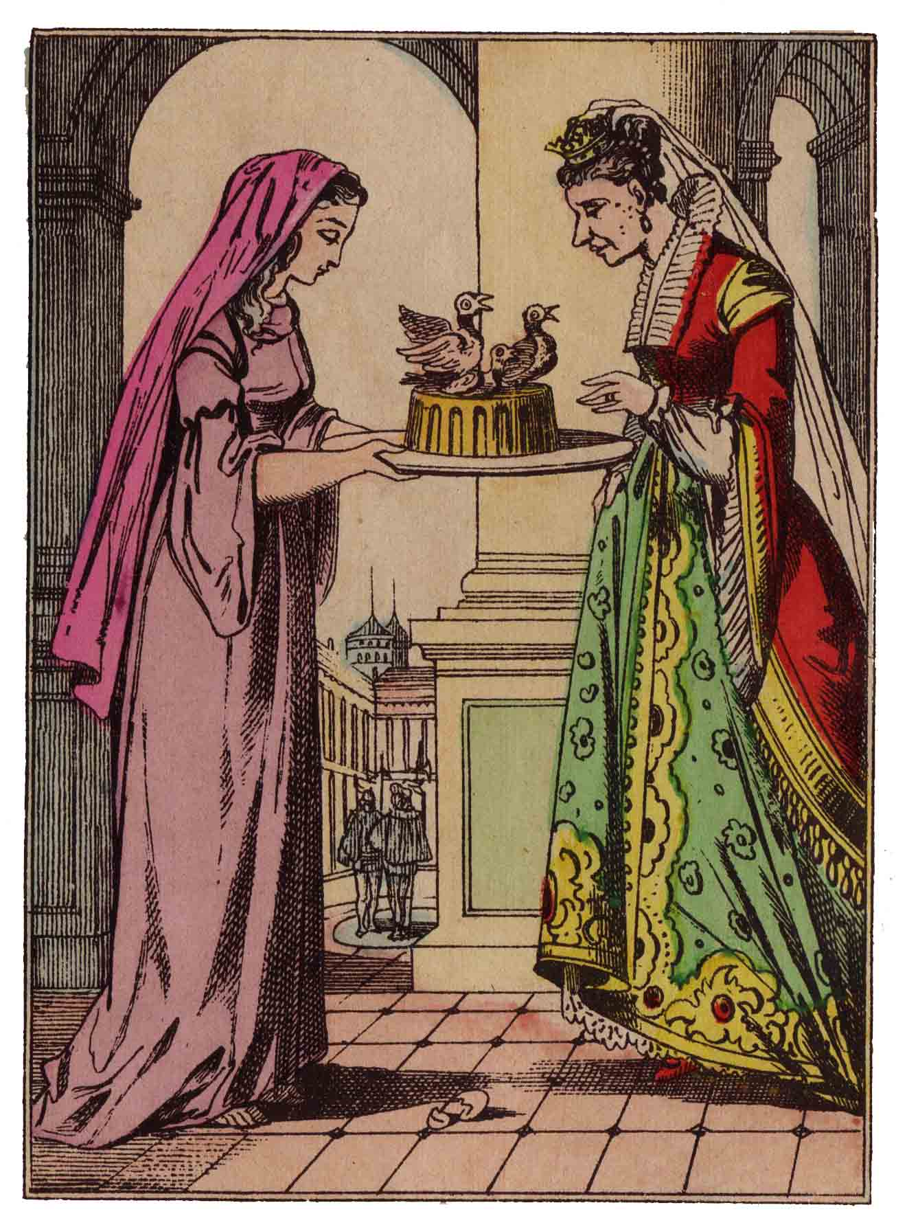 Images d'Épinal : L’Oiseau bleu